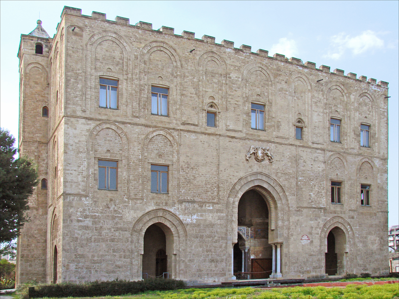 La façade du palais de la Zisa donnant sur le jardin __________ La Zisa (aziz en arabe signifie "la splendide") était une des résidences, situées en dehors de la Palerme médiévale, dans le parc royal appelé Génoarde, construites par les souverains normands de Sicile et destinées à leurs loisirs. La construction du palais a commencé en 1164 sous le règne de Guillaume de Hauteville, dans le style arabe, elle a été achevée sous celui de son fils vers 1175. Remaniée de nombreuses fois depuis sa construction, des travaux de restauration lui ont rendu un aspect voisin de l'origine. Elle est dotée d'un système de refroidissement de l'air grâce à des ouvertures judicieusement placées dans les différentes pièces du bâtiment. Les parties basses comprenaient des pièces destinées aux réceptions, les parties hautes étaient privées. Située au rez-de-chaussée, la salle de la fontaine était la principale salle de réception du palais, elle était ouverte sur les jardins, sa fontaine déversait l'eau dans le grand bassin extérieur à travers les vasques visibles sur la photo. La salle occupe un espace de deux étages, elle est conçue comme un îwân orné de niches, aménagées dans l’épaisseur des murs et décorées de muqarnas. Une frise en mosaïque représentant des chasseurs et des paons court le long des murs. Les photographies sont interdites dans les autres espaces de l'édifice, les étages supérieurs comprennent un petit musée d'art islamique sans grand intérêt. La notice de la Zisa sur la base Qantara Article de Wikipedia sur la Zisa site de l'auteur en 2001